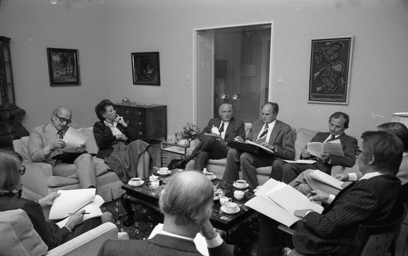 Frau Mildred Scheel empfängt Mitglieder der Gründungsversammlung der deutschen Krebshilfe e.V. im Bundespräsidenten-Amt